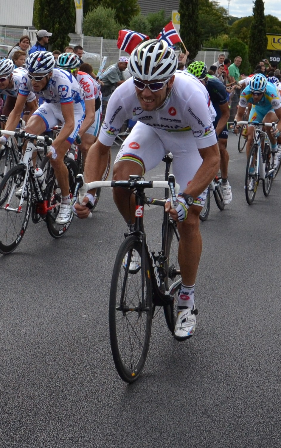 Thor Hushovd portant le maillot de champion du monde 2010 au Tour de France 2011, le dimanche 17 juillet 2011 lors de l'arrivée de la 15ème étape à Montpellier.